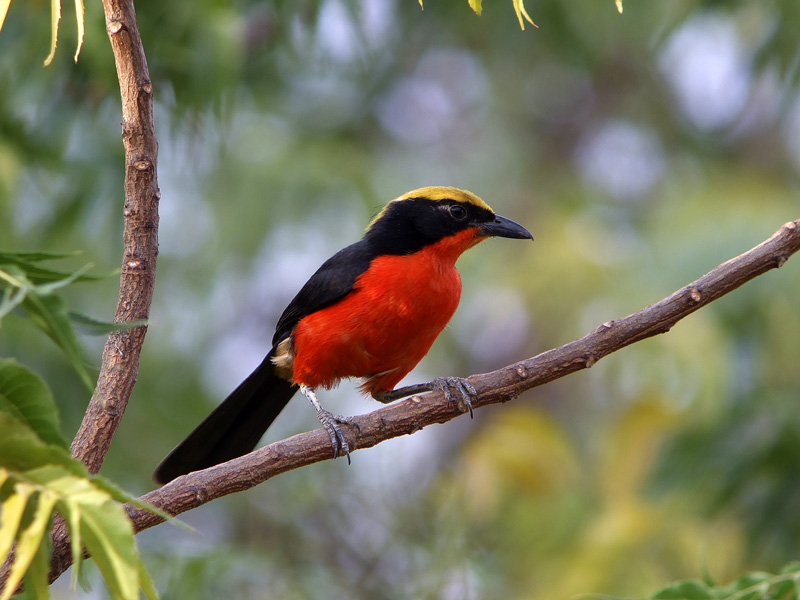 Laniarius barbarus